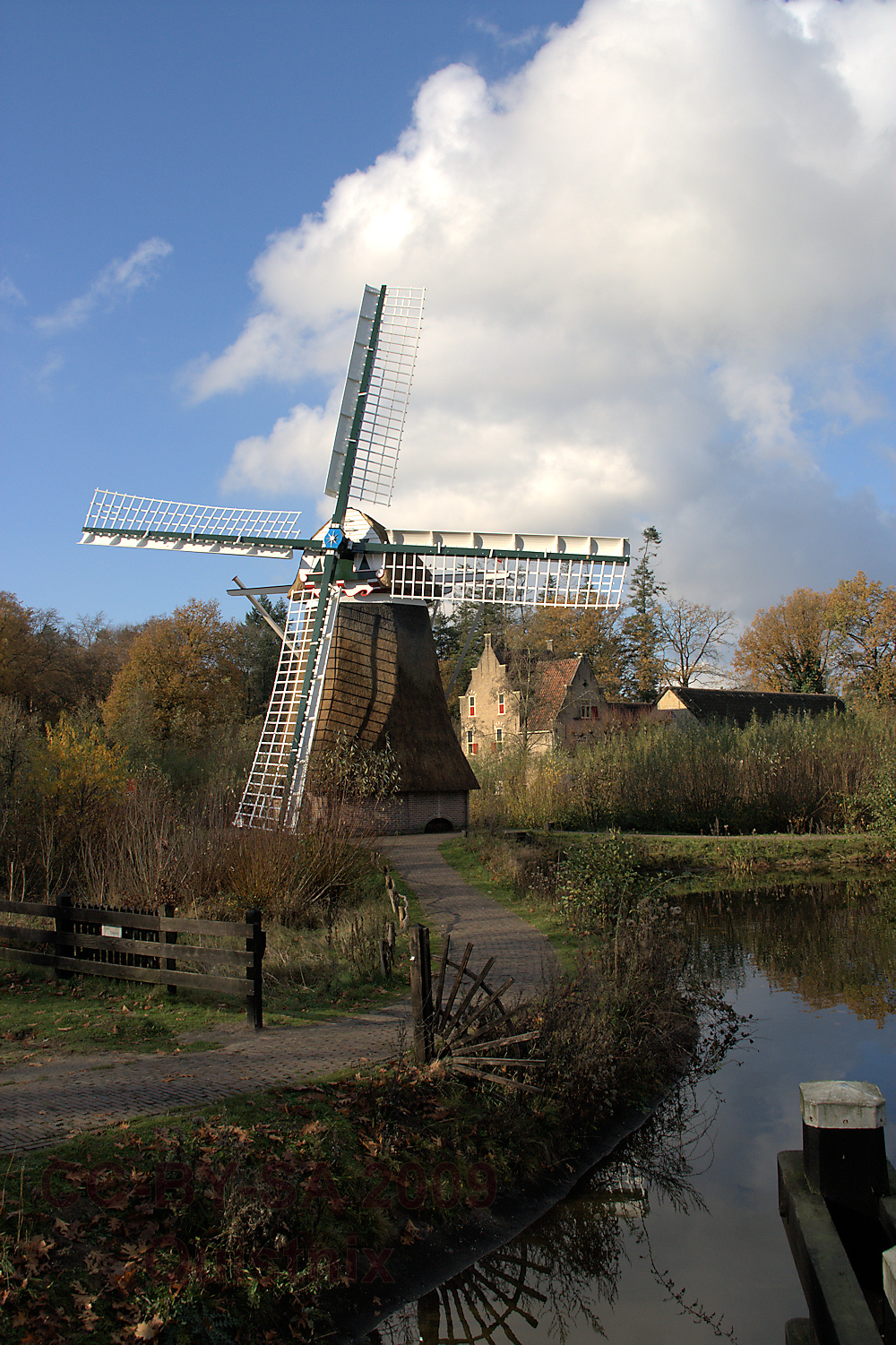 Arnhem: Nederlands Openluchtmuseum - Poldermolen in de herfst